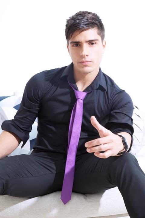 Photoshoot 2012